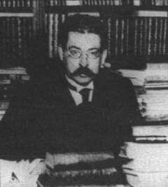 Fotografía de José Enrique Rodó (1871 - 1917), escritor y político uruguayo.